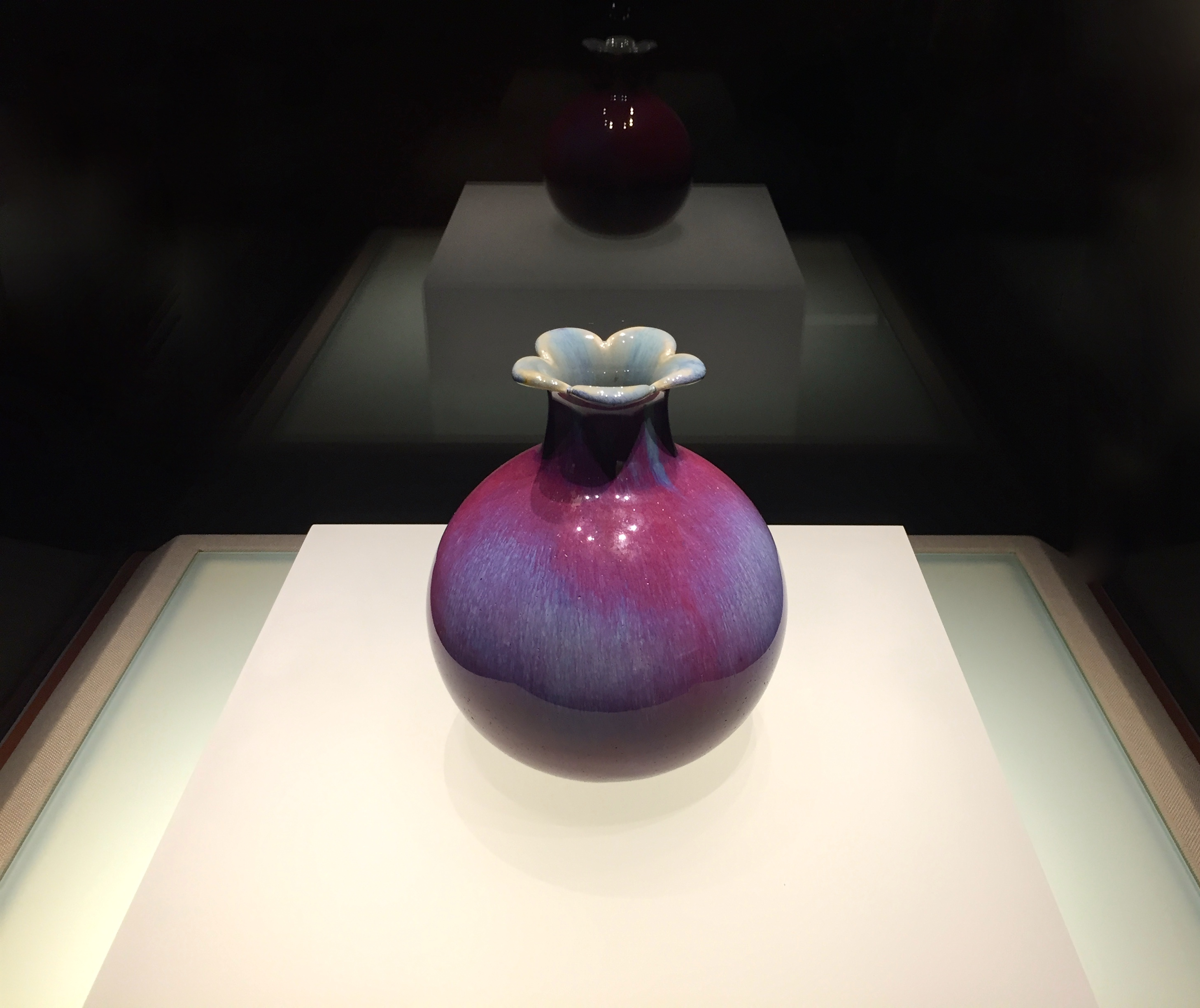 窑变红釉石榴尊藏于辽宁省博物馆